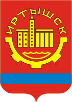 Герб Иртышска